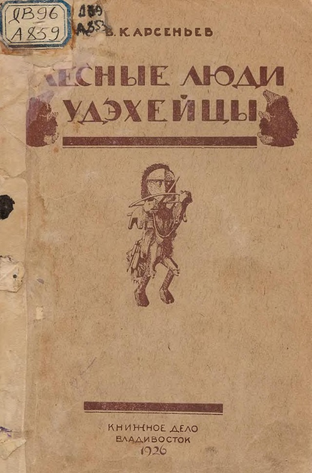 Обложка книги В. К. Арсеньев. Лесные люди — удэхейцы. Владивосток: Книжное дело, 1926.